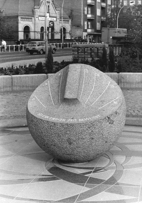 ADN-ZB Settnik 8.10.87 Berlin: Eröffnung des Zeiss-Großplanetariums. Die Sonnenuhr vor dem Planetarium zeigt die wahre Zeit. Diese hier geht gut sechs Minuten nach. Das kommt daher, daß Berlin nicht genau auf dem 15. Grad östlicher Länge liegt, dem Meridian, der die Mitteleuropäische Zeit bestimmt. Achtung: Sperrfrist 9.10.97 11.30Uhr!!!